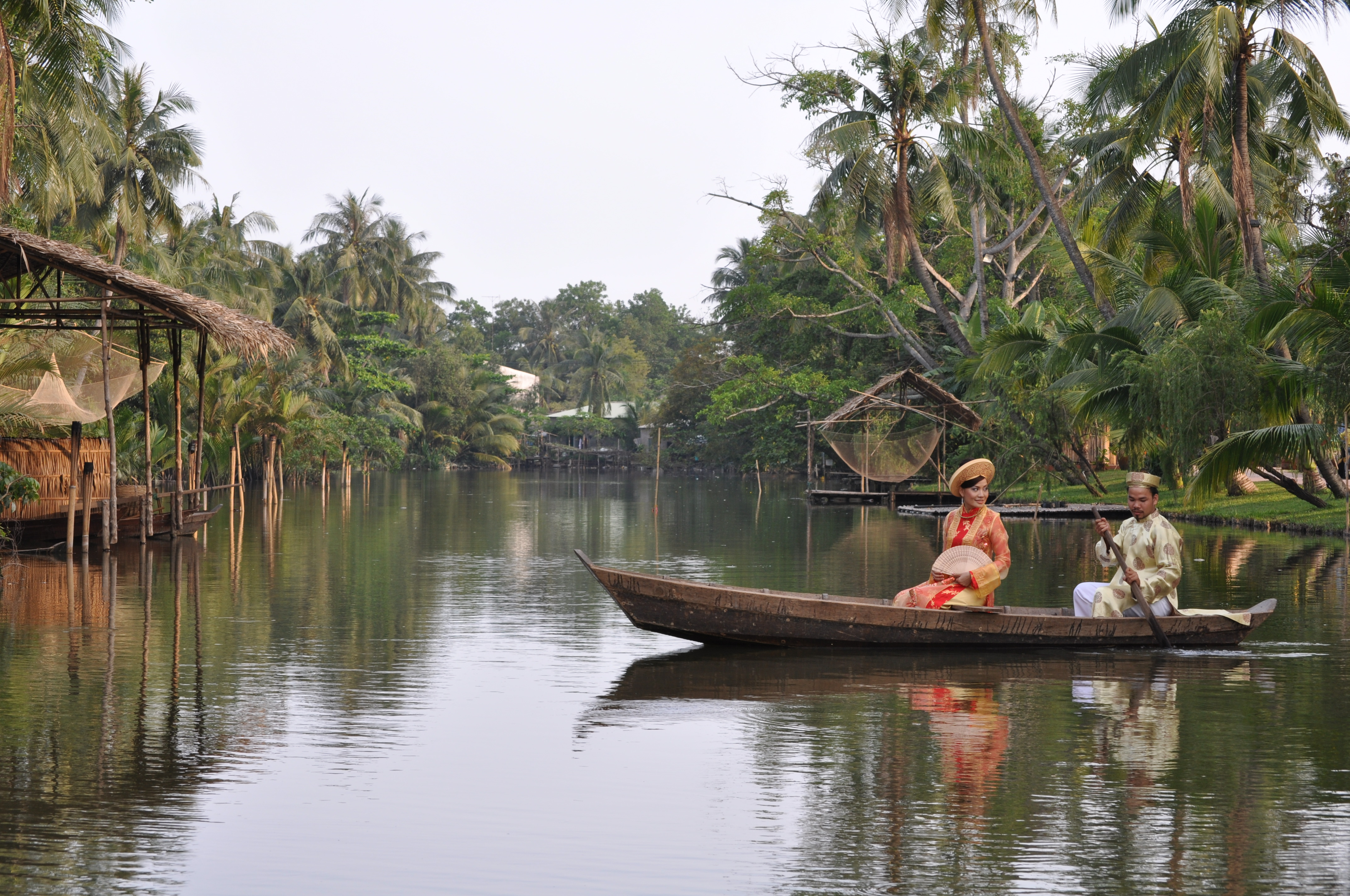 Binh Quoi Tourist Village